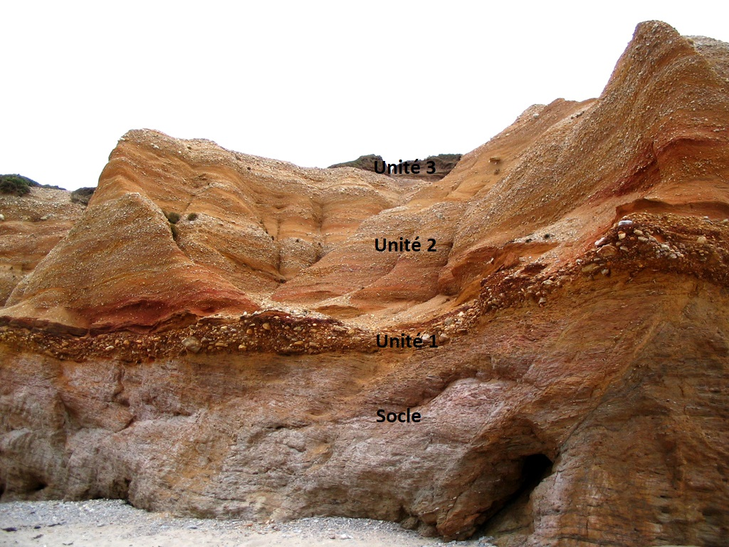 Formations géologiques sur la falaise de la plage de la Mine d'Or